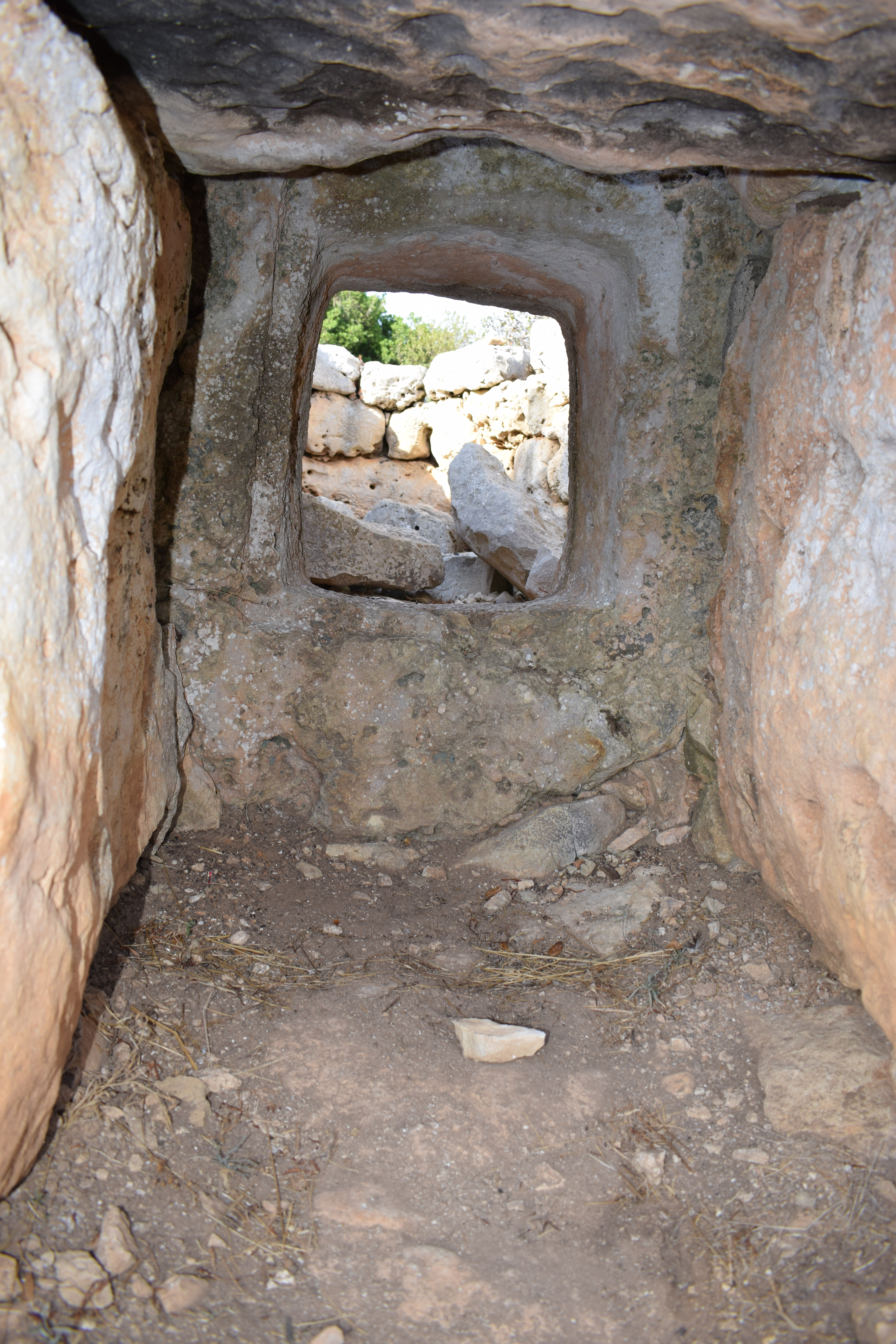 Die Naveta de Biniac West in der Gemeinde Alaior, Menorca.